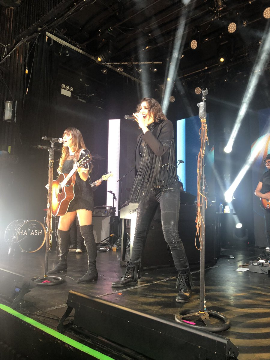 Ha*Ash Irving Plaza NY